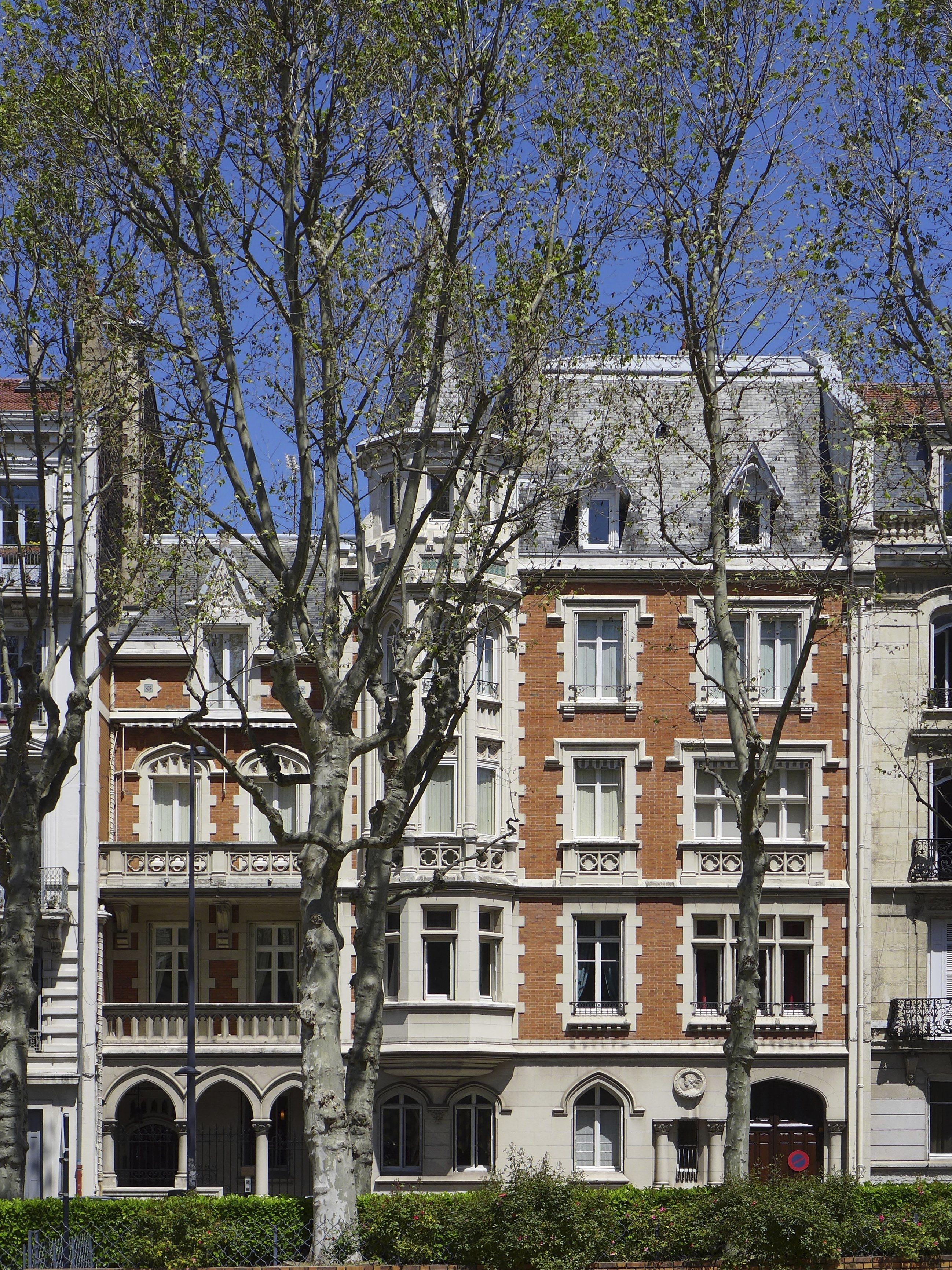 Vue d'ensemble du palais Mimard à Saint-Etienne, chef-lieu du département de la Loire. Ce bâtiment est le fruit de la rencontre de 2 grandes figures stéphanoises : l'architecte Léon Lamaizière qui a profondément marqué le paysage urbain de Saint-Etienne via de multiples réalisations et Etienne Mimard, précurseur de la Vente Par Correspondance avec Manufrance. .